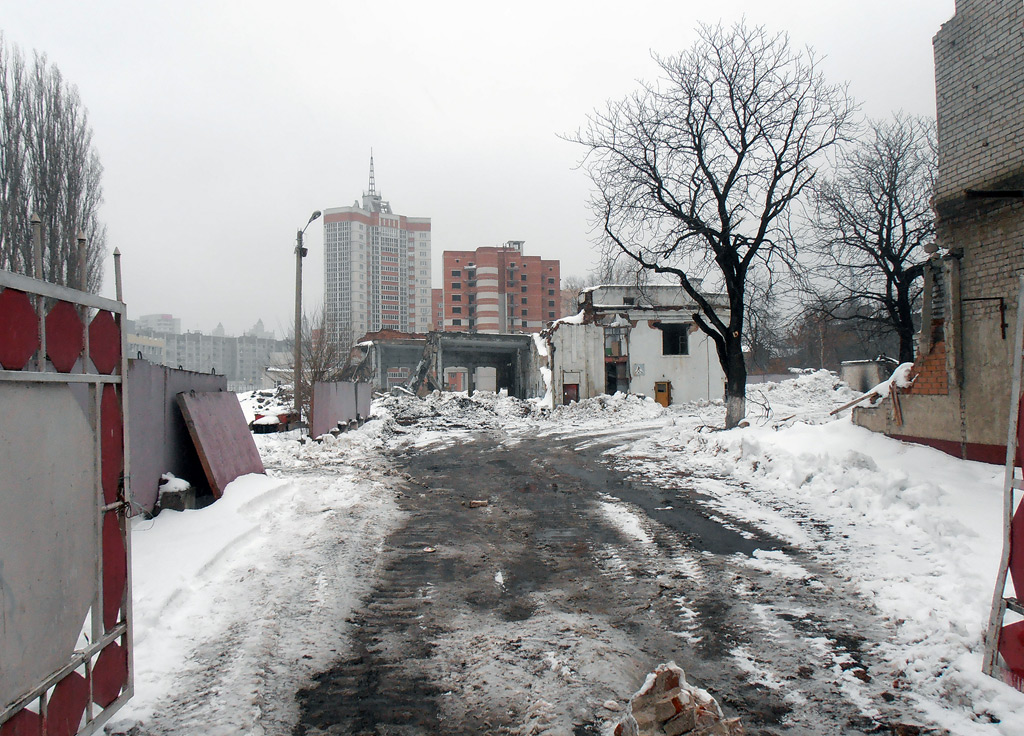 Снос корпуса трамвайного депо №1